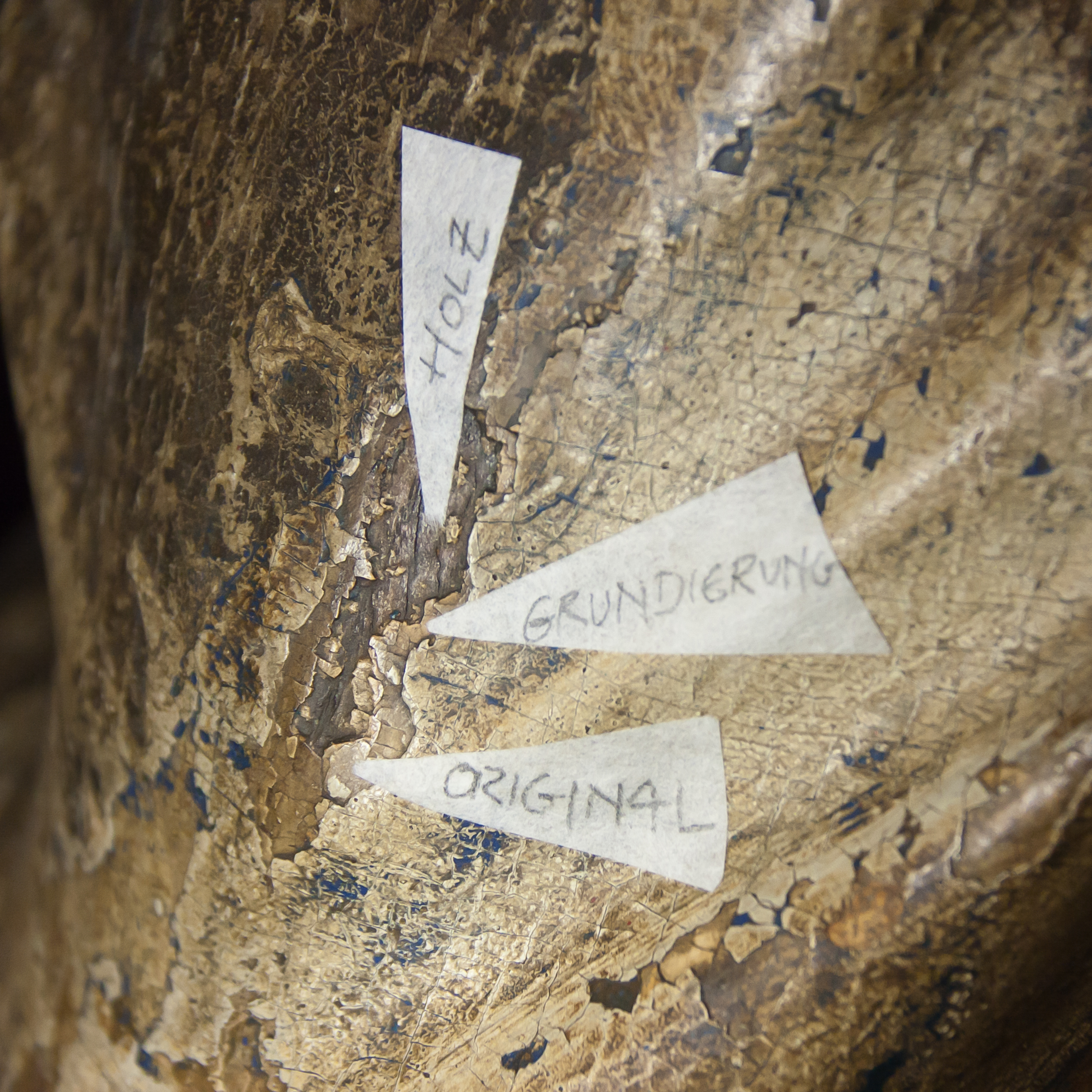 Museum Schnütgen, Köln: Im Rahmen einer Führung zum "Thementag Restaurierung" konnten Besucher Details der Kölner Rathauspropheten unter Anleitung einer Kunsthistorikerin, einer Restauratorin und einer Konservatorin durch eine Lupe und ein Stereomikroskop betrachten. Foto: Nahaufnahme einer Figur mit Schäden an der Fassung. Zu sehen sind die (beschrifteten) Ebenen „Holz“, „Grundierung“ und „Original“(fassung).